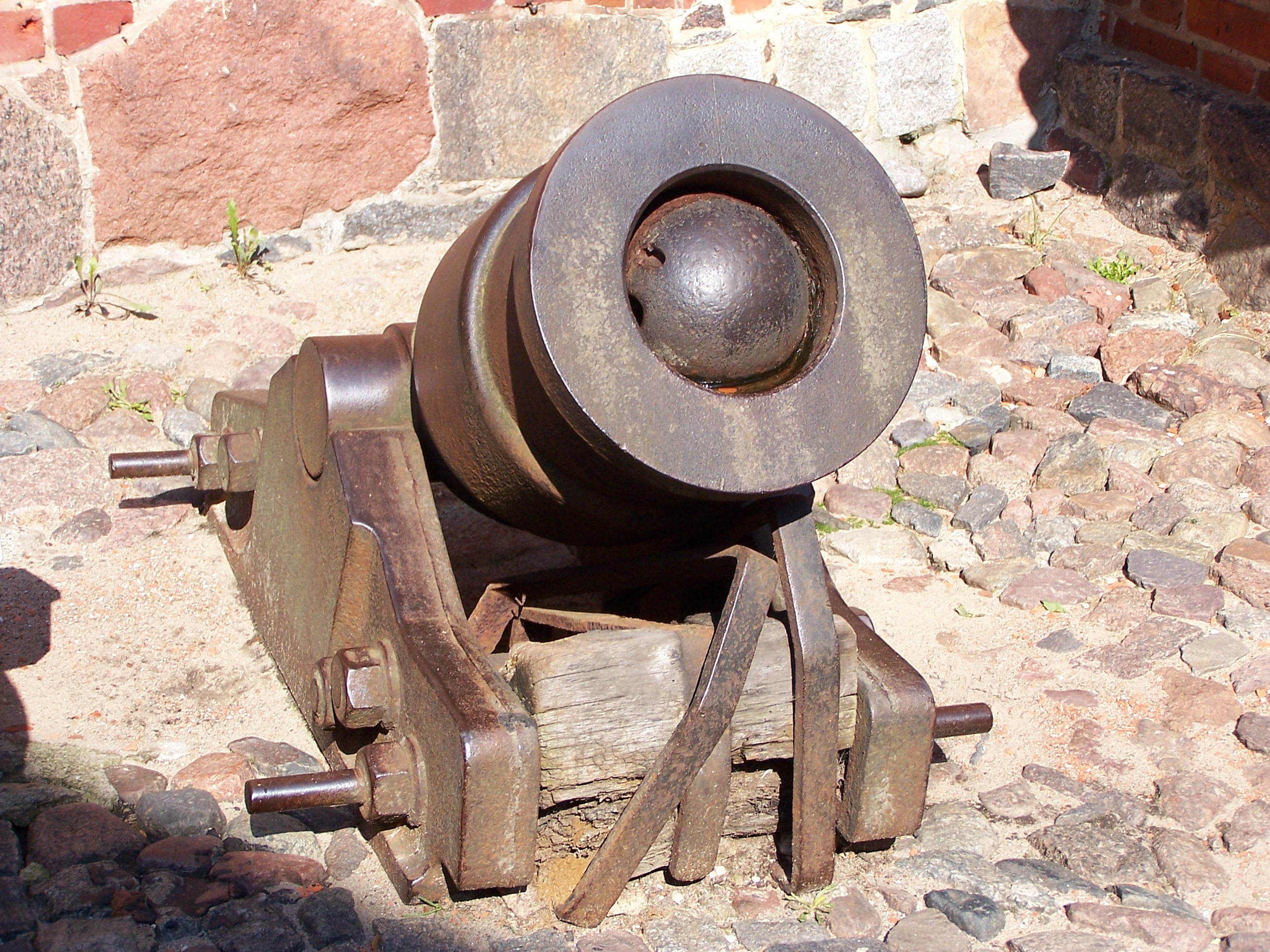 Bombarda na zamku średnim w Malborku.